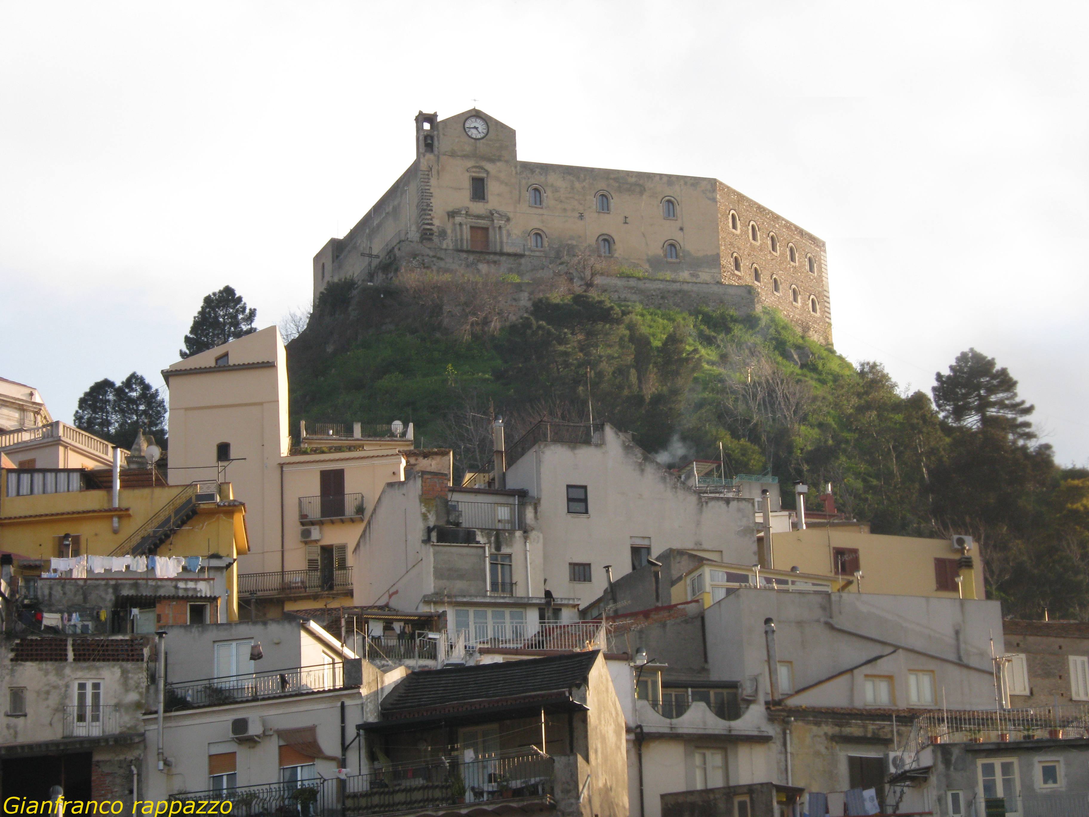 Castle, Santa Lucia del Mela